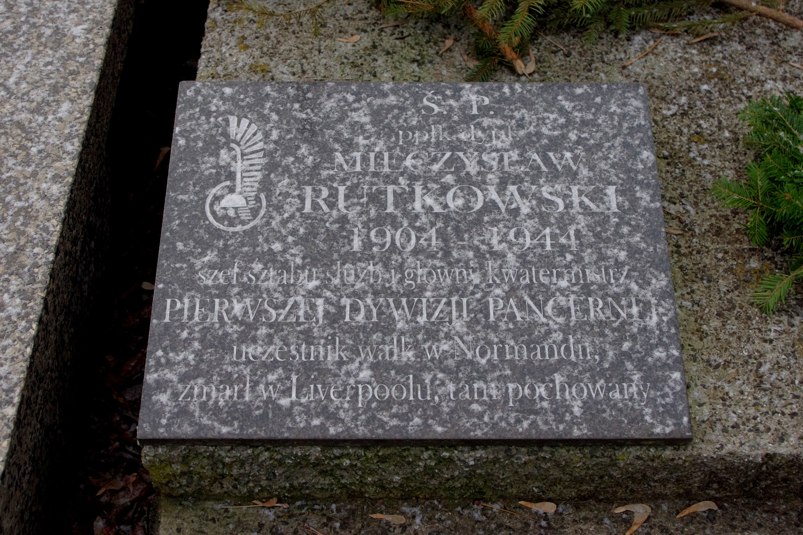 Grób symboliczny podpułkownika dyp. Mieczysława Rutkowskiego (1904-1944) - szefa sztabu służ i głównego kwatermistrz I Dywizji Pancernej, uczestnika walk o Normandię pochowanego na cmentarzu w Liverpoolu. Tablica na grobie inż. budownictwa wodnego Mieczysława Rutkowskiego (1929-2010), na Cmentarzu Wolskim w Warszawie